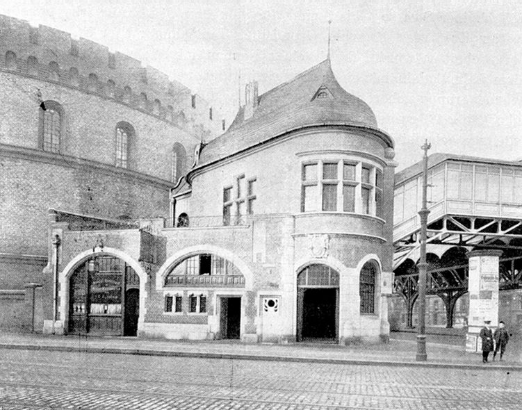 Treppengebäude des Hochbahnhofs Prinzenstraße (zerstört), Architekt: paul Wittig